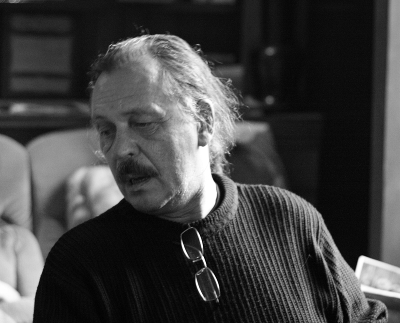 Украинский литератор Василий Портяк